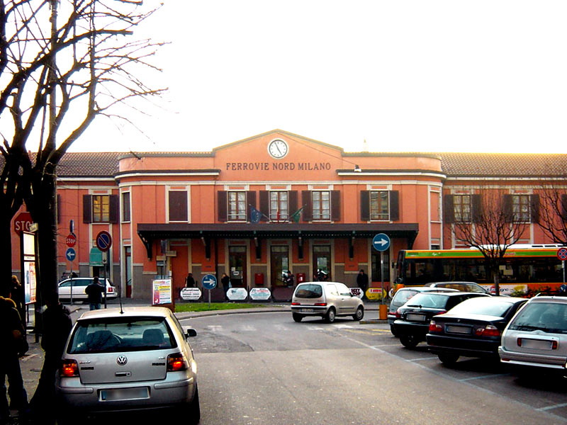 Saronno (VA) - La stazione delle Ferrovie Nord Milano Immagine da me ripresa e concessa in PD utente12:52, 12 feb 2007 (CET)